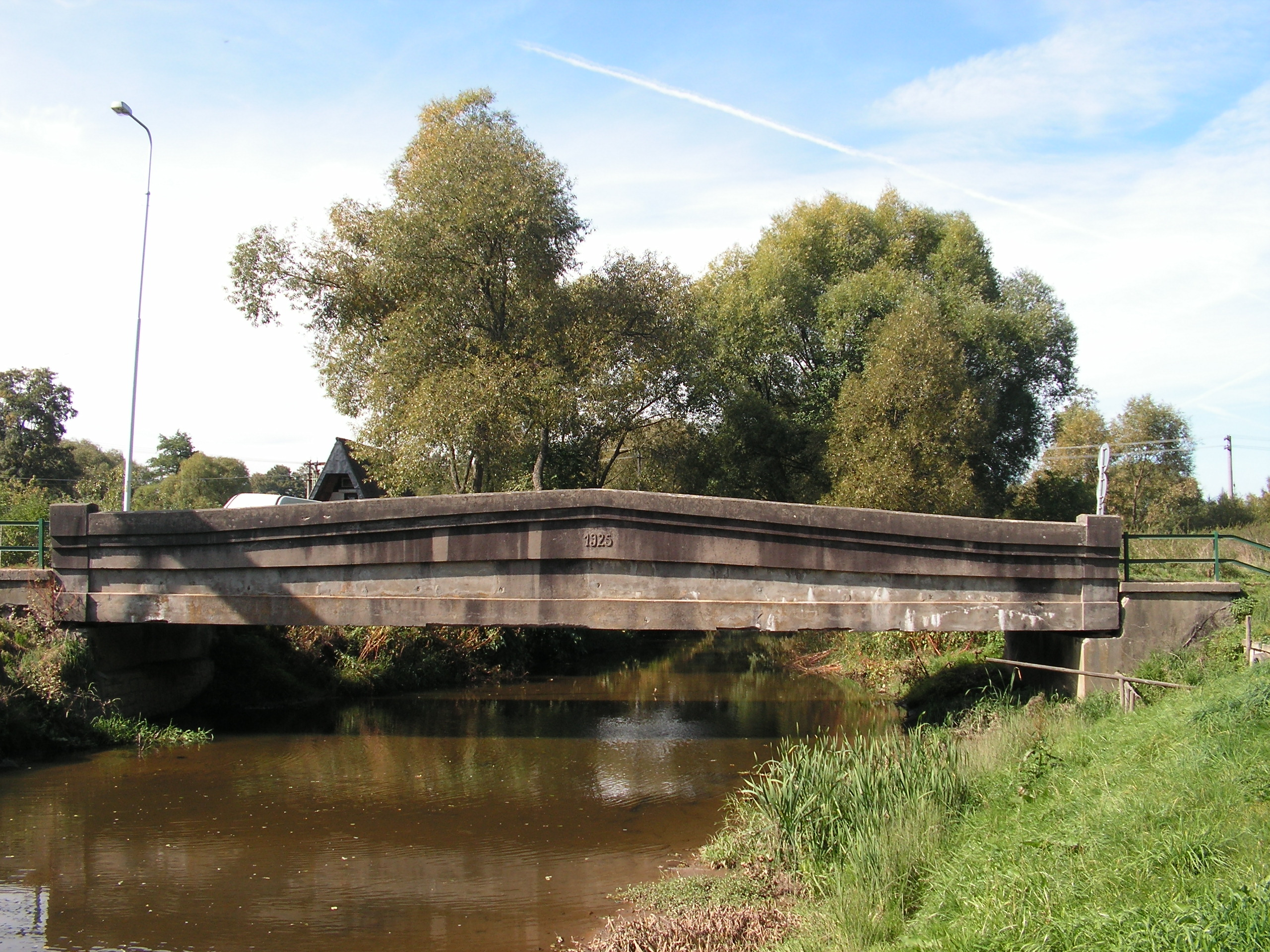 Most přes řeku Šlapanku v Mírovce.